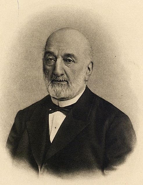 Делянов, Иван Давыдович